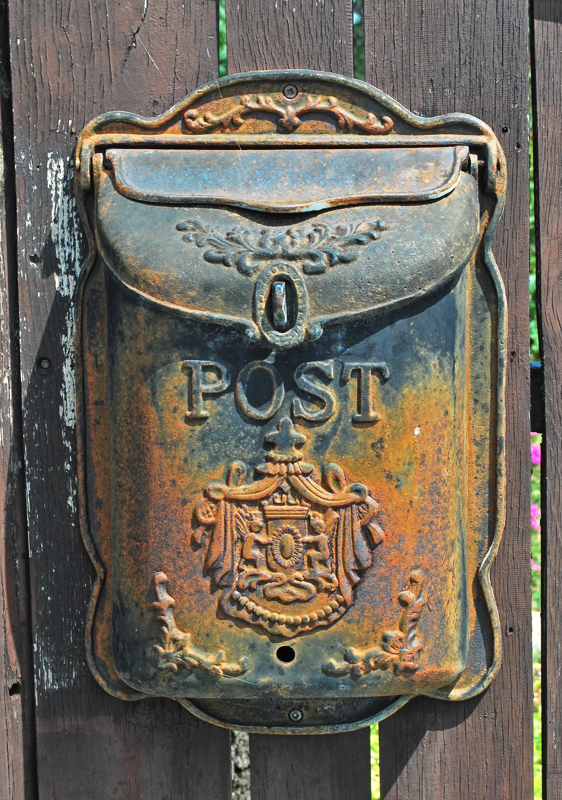 Ódon levélszekrény Paloznakon